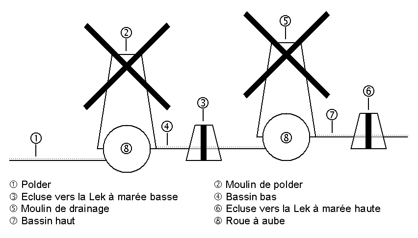 Schéma de drainage à paliers des polders de Kinderdijk Jagrob 08:14, 3 October 2006 (UTC)